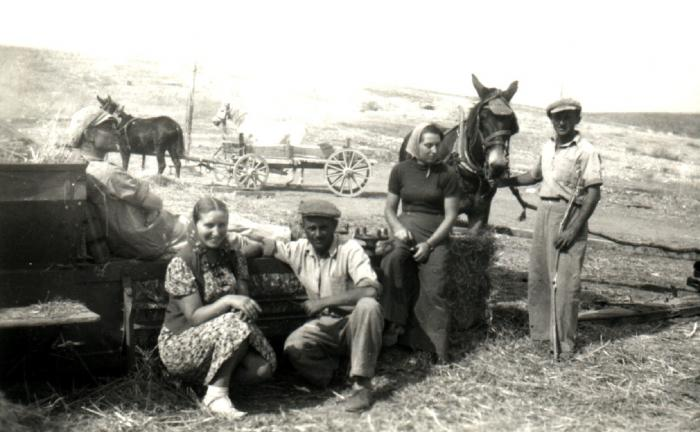 חברים מקיבוץ עין השופט בשעת הפסקה בשדה